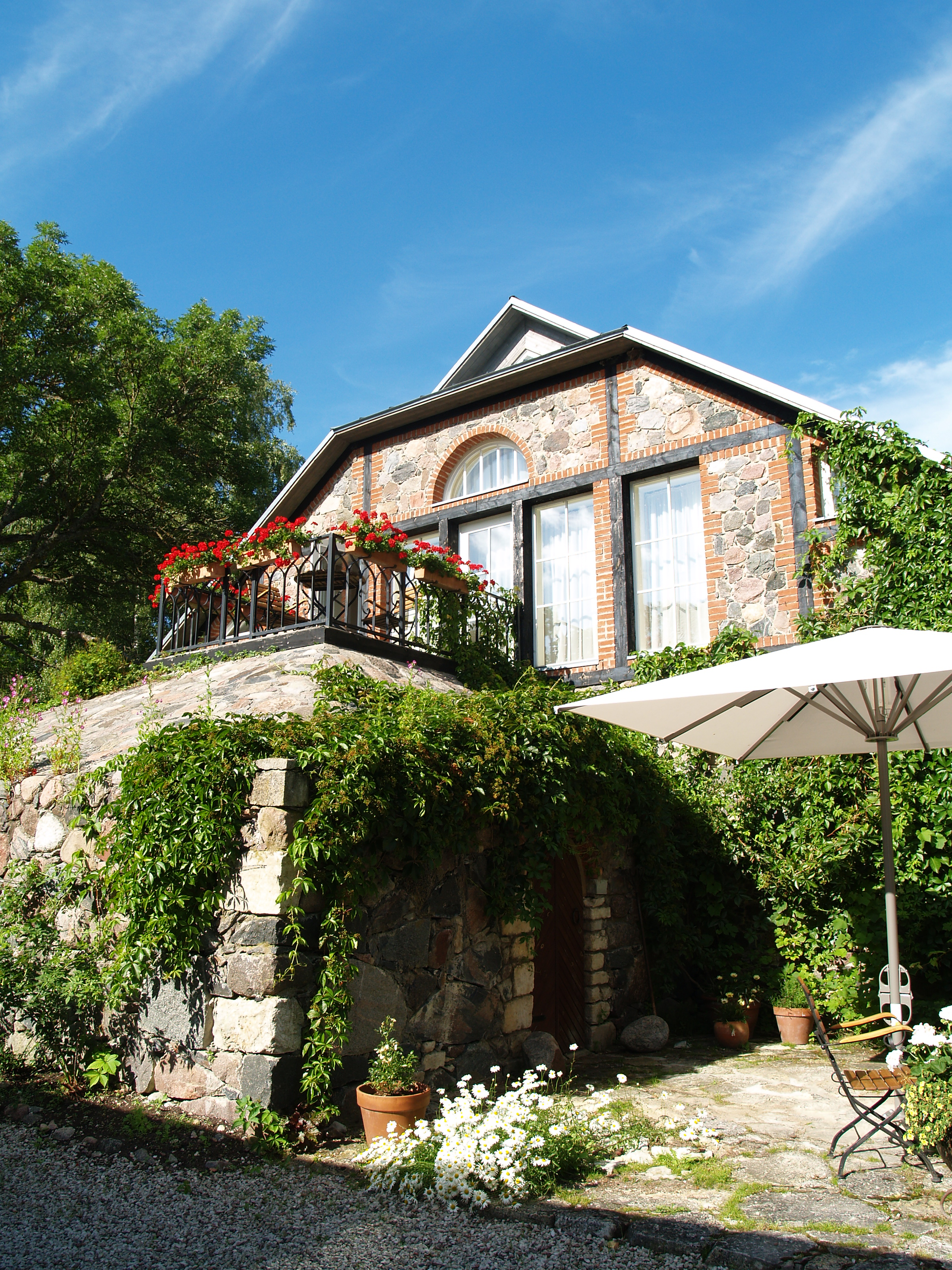 Pädaste mõisa tall-tõllakuur mõisa meierei poolselt küljelt.